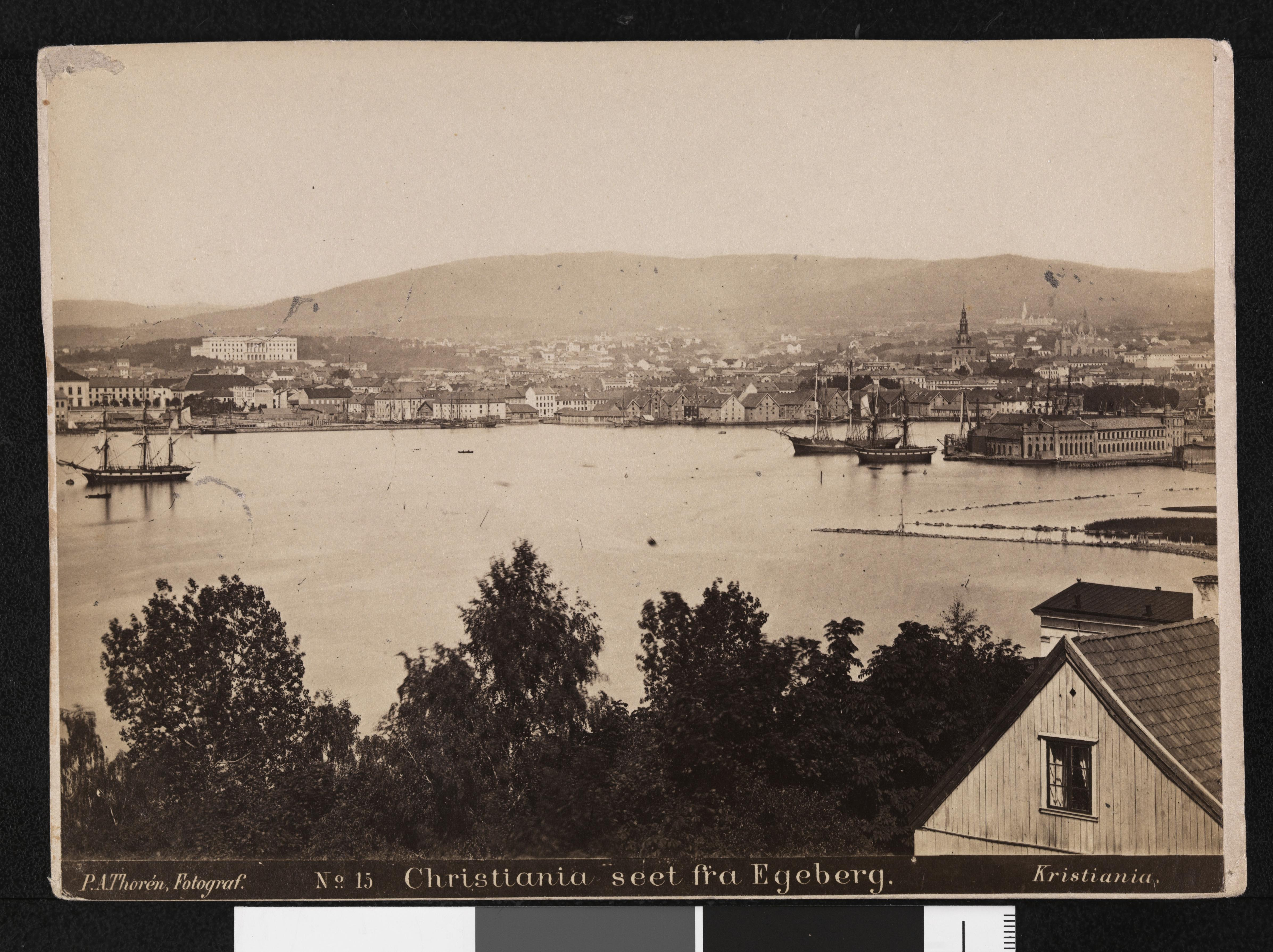 Christiania sett fra Ekeberg